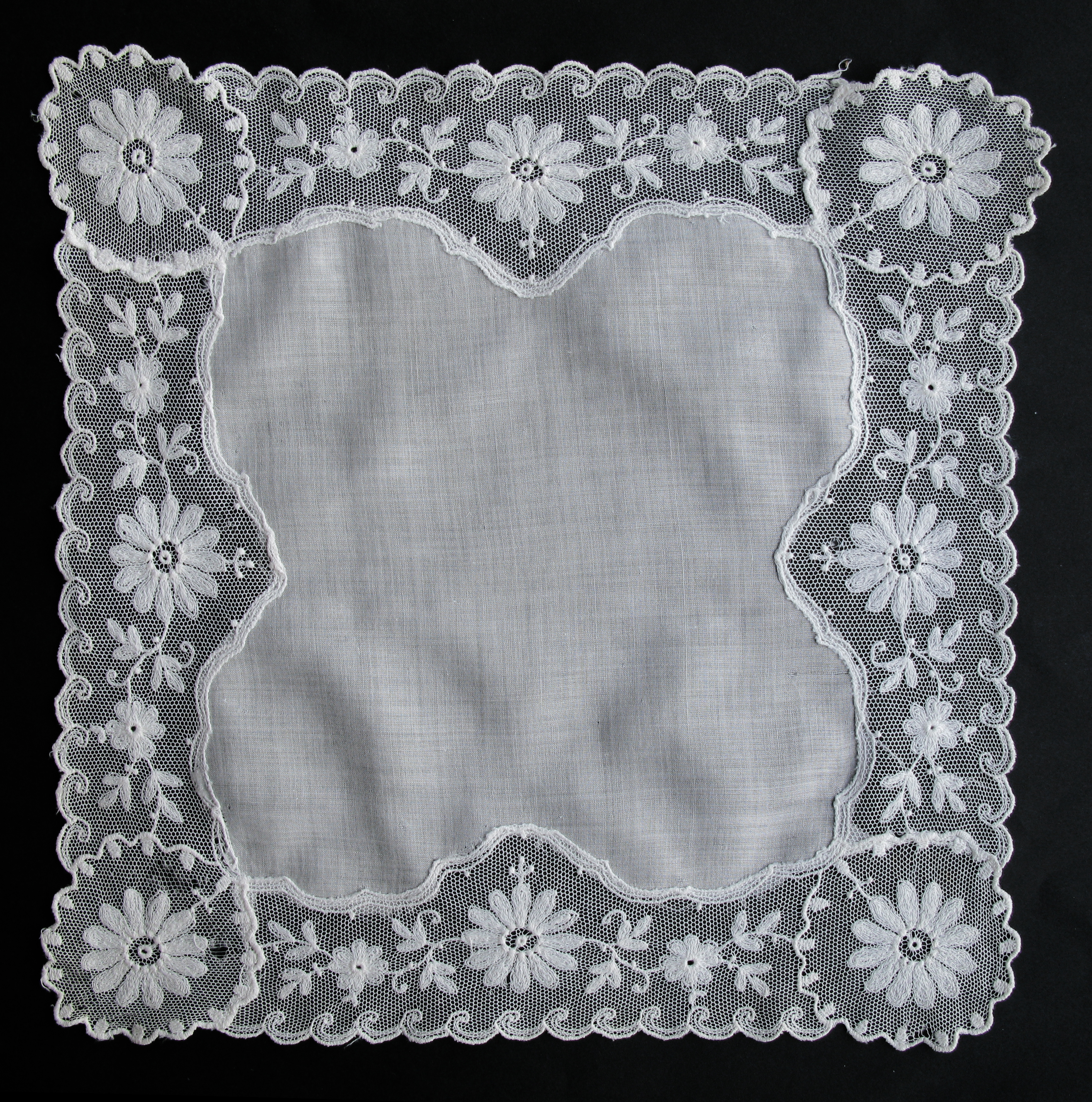 Altes Tuch mit handgearbeiteter Tüllspitze